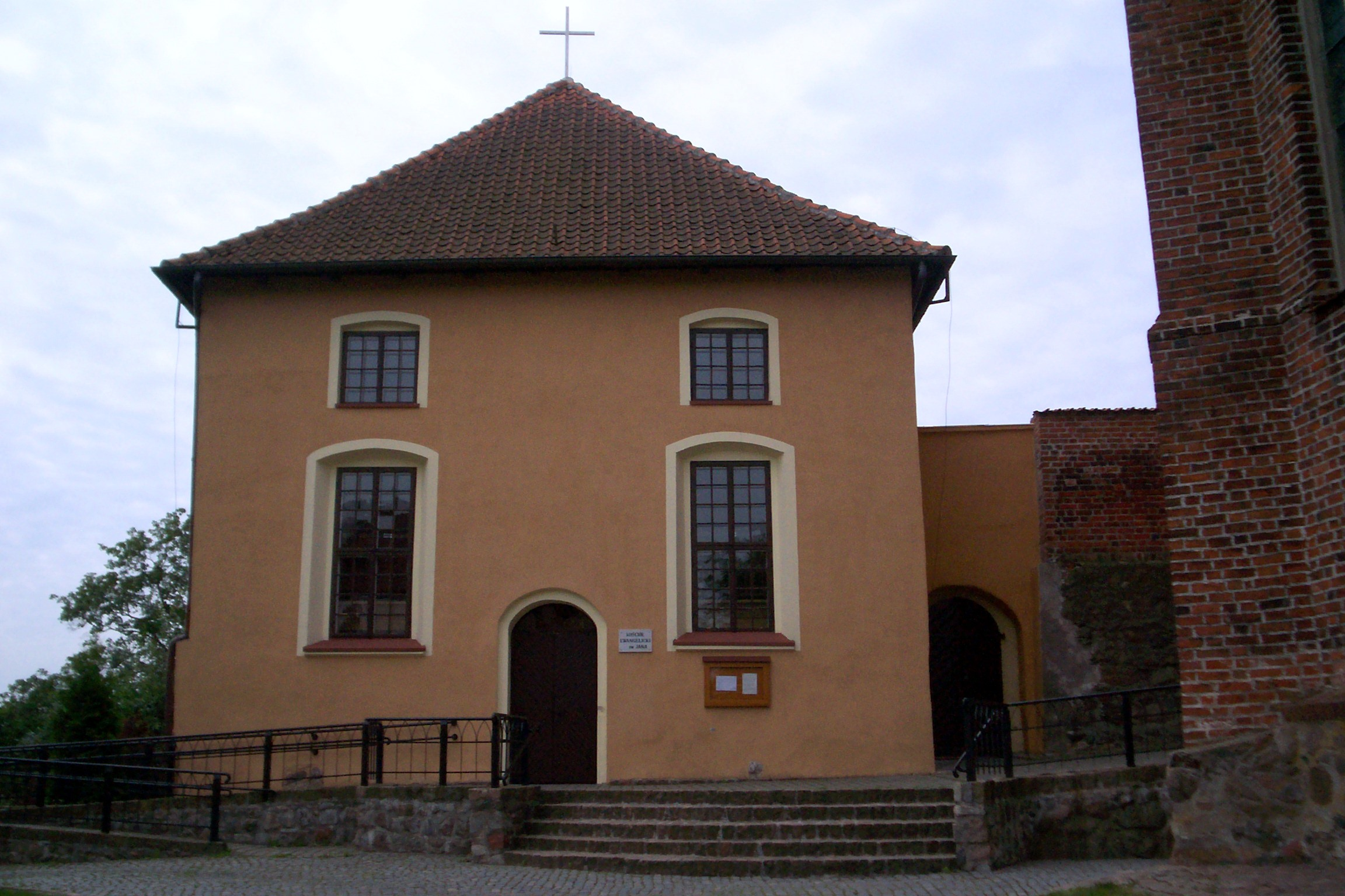 Kościół ewangelicko-augsburski pod wezwaniem św. Jana w Kętrzynie